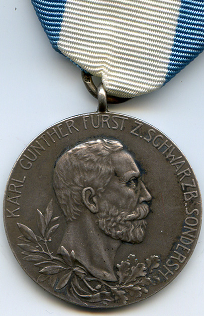 Vorderseite der Regierungsjubiläumsmedaille 1905 von Schwarzburg-Sondershausen.